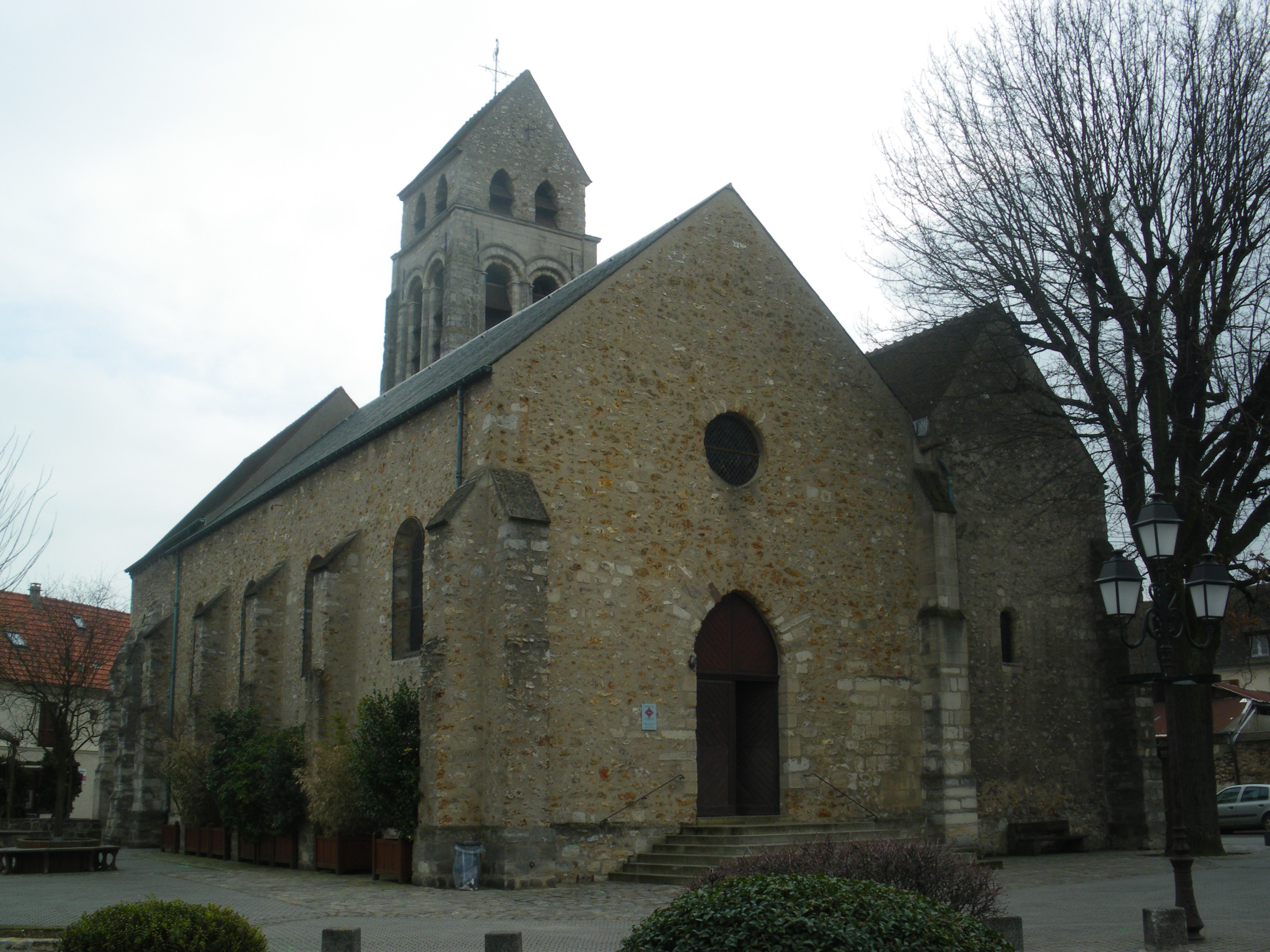 Eglise de Wissous, Essonne, France